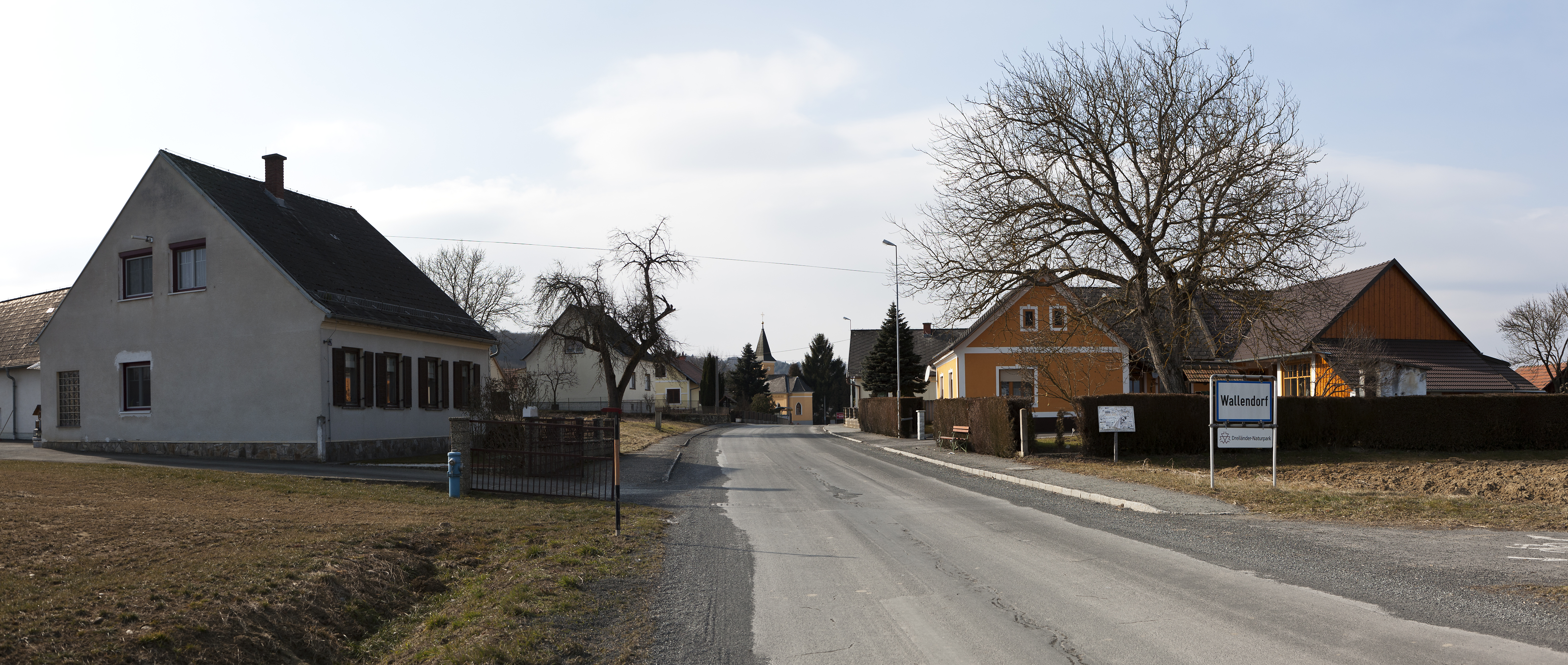 Wallendorf